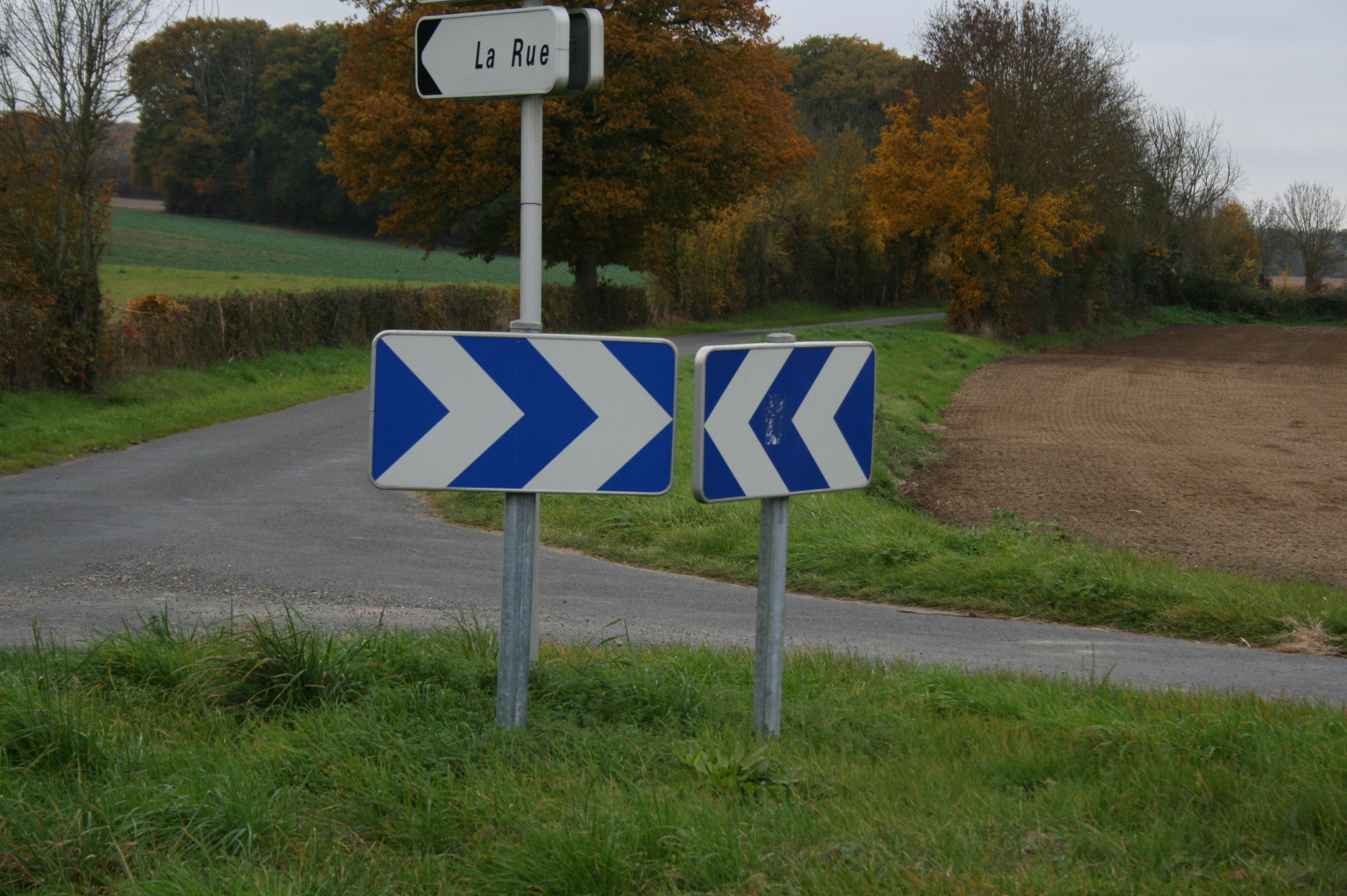 Balises de virage J4 mal utilisées (France)